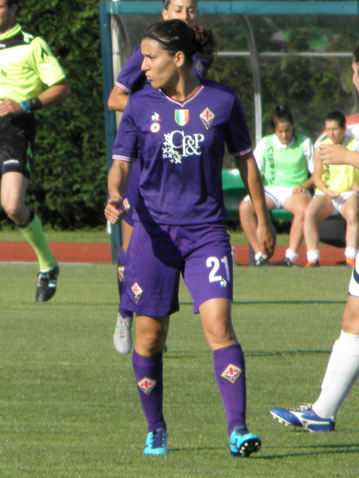 Abano Terme, Stadio delle Terme: 16 giugno 2018, spareggio UEFA Women's Champions League. Marta Carissimi.